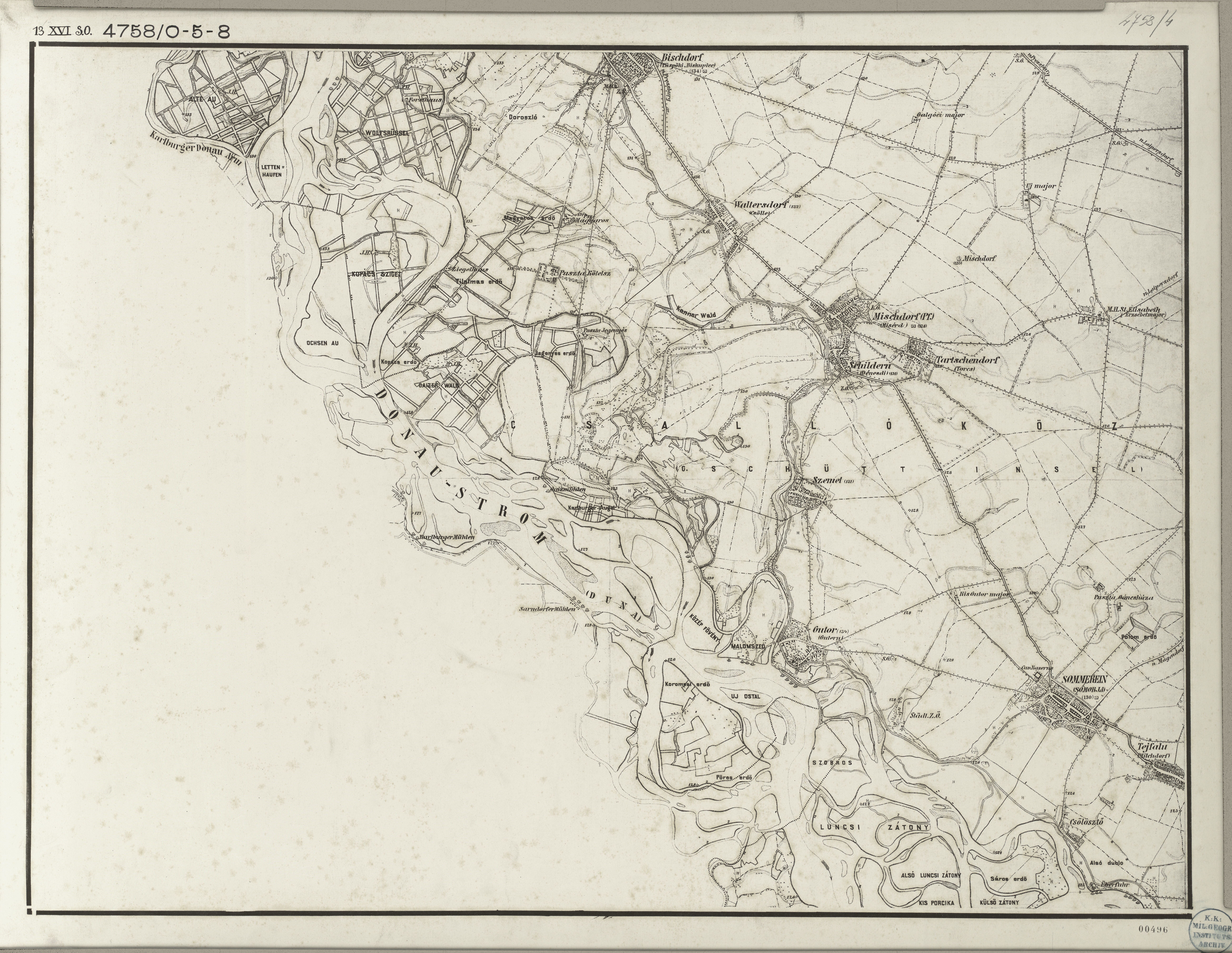 historische Landkarte: Arbeitsfassung von: Gradkartenblatt Zone 13 Colonne XVI Section SO (Südost) (später 4758/O-5-8 oder 4758/4), slowakischer (früher tschechoslowakischer) Teil im Nordosten. Sommerein / Somorja / Šamorín, Bischdorf (Podunajské Biskupice, bis 1944 slowakisch „Biskupice pri Dunaji“ - bis 1927 „Biskupice“, ungarisch Pozsonypüspöki - bis 1907 Püspöki), Waltersdorf (Rovinka, ab 1927 bis 1948 slowakisch „Čela“ - 1948–1960 „Štefánikovce“, Csölle), Mischdorf, Schildern, Szemet, Gutor, Tartschendorf, Tejfalu, Csölosztö usw. südöstlich von Bratislava. Franzisco-josephinische (3.) Landesaufnahme der österreichisch-ungarischen Monarchie. Maßstab 1:25.000.